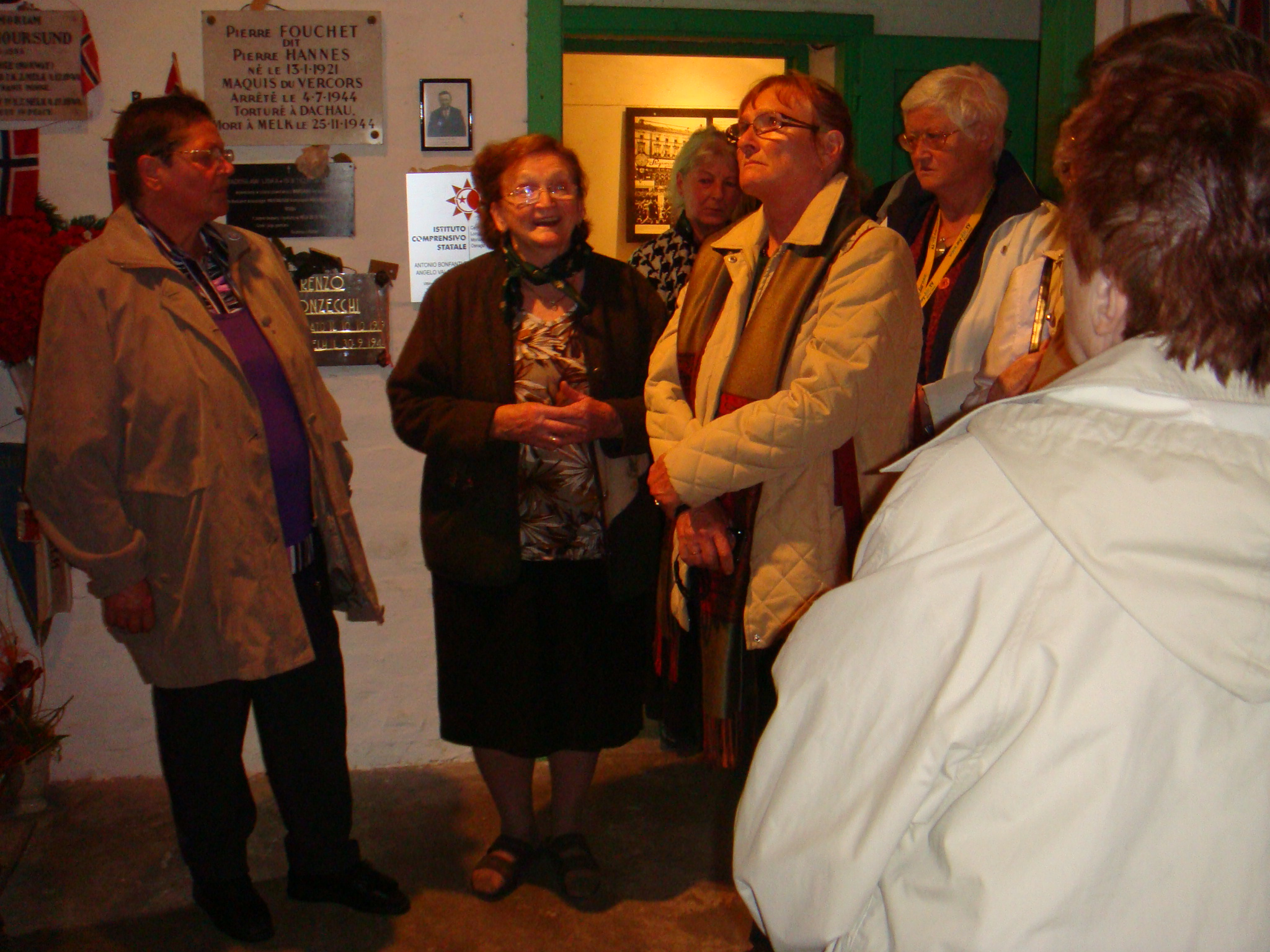 Die Betreuerin der Gedenkstätte Berta Blak beim Rundgang